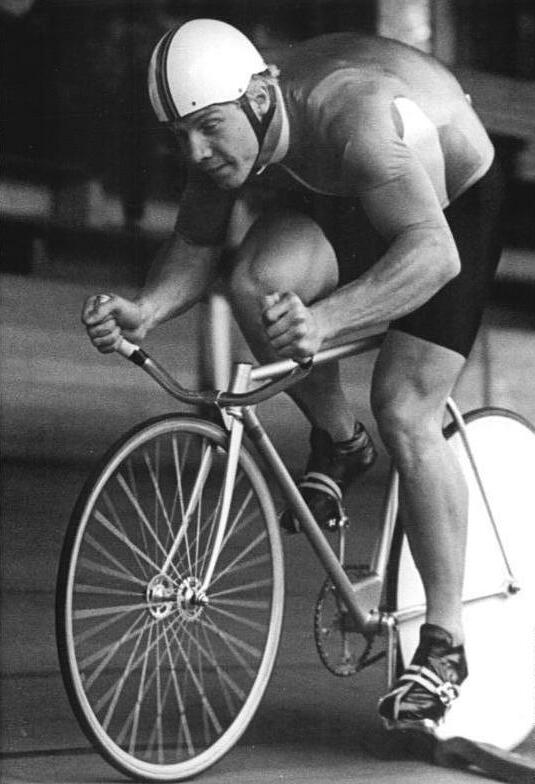 Maik Malchow ADN-ZB Kluge 25.6.87 Leipzig: 39. DDR-Meisterschaften im Bahnradasport - Im 1 000-m-Zeitfahren seitzte sich der WM-Dritte Jens Glücklich gegen Weltmeister Maio Machow durch. Es sit der erste Titel des 20jährigen Cottbusers bei den Senioren.